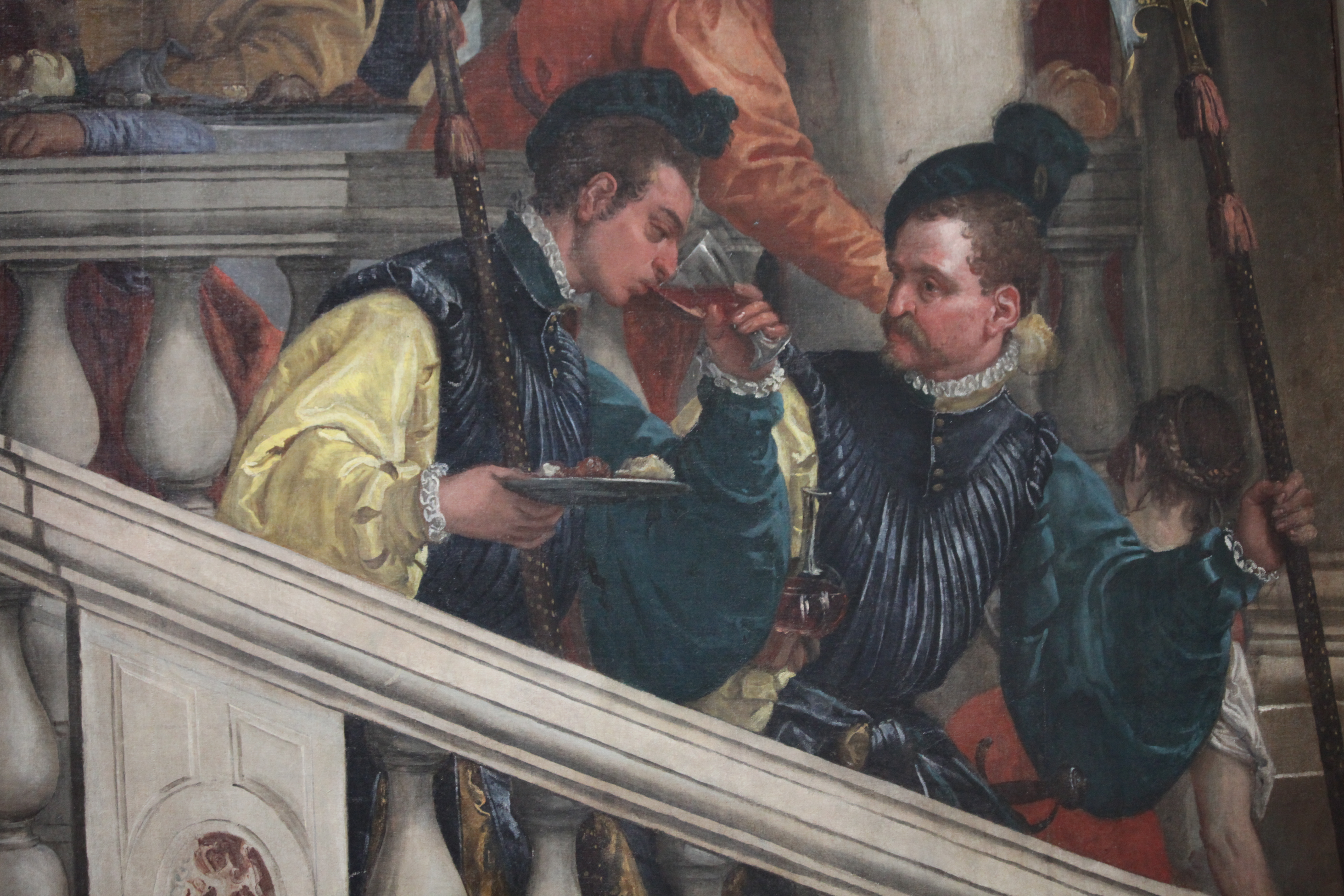 Gallerie dell'Accademia - MIBAC This is a photo of a monument which is part of cultural heritage of Italy.